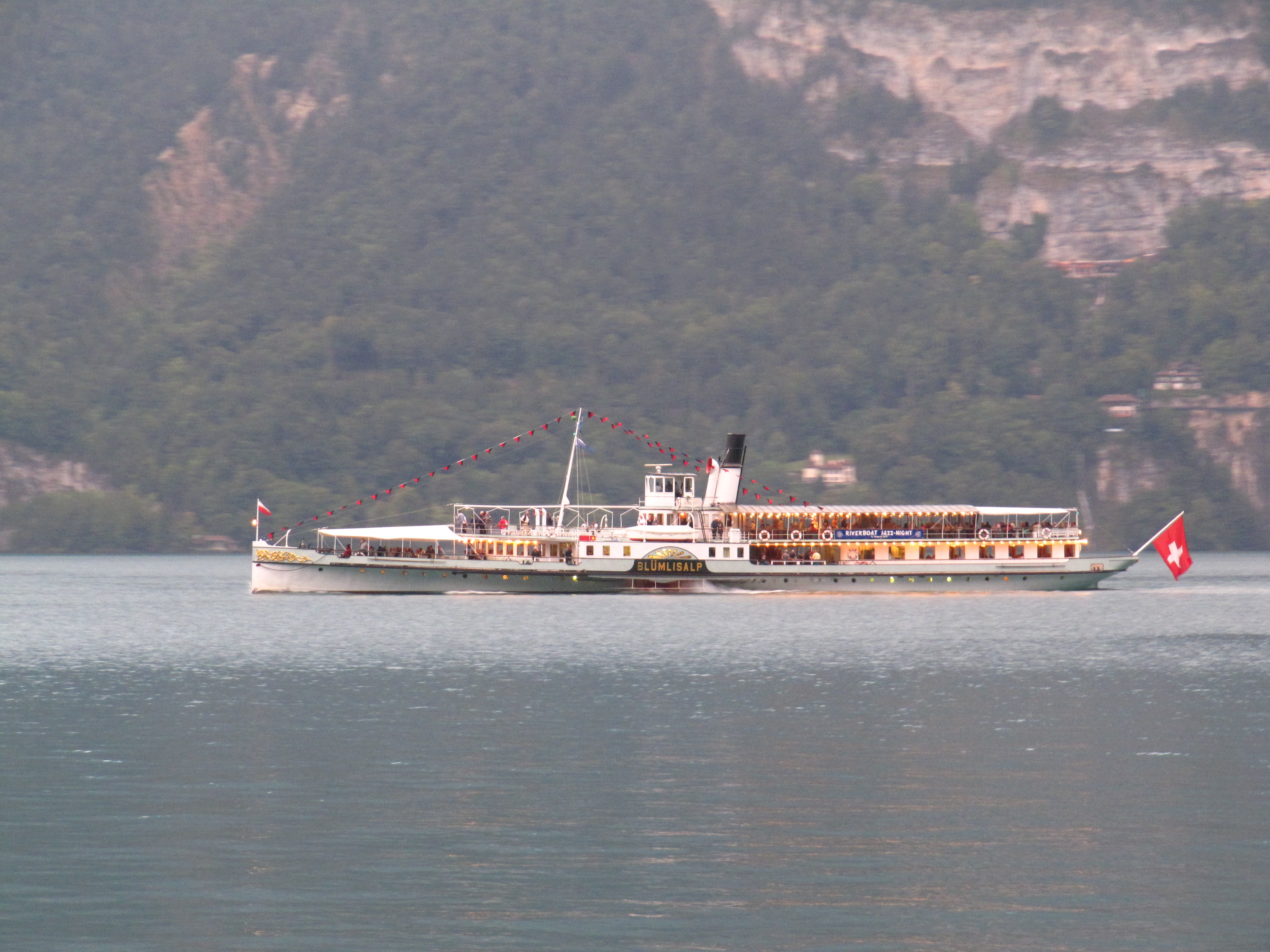 Kanton Bern, Thunersee: Raddampfer Blüemlisalp auf Abendrundfahrt vor den Beatushöhlen